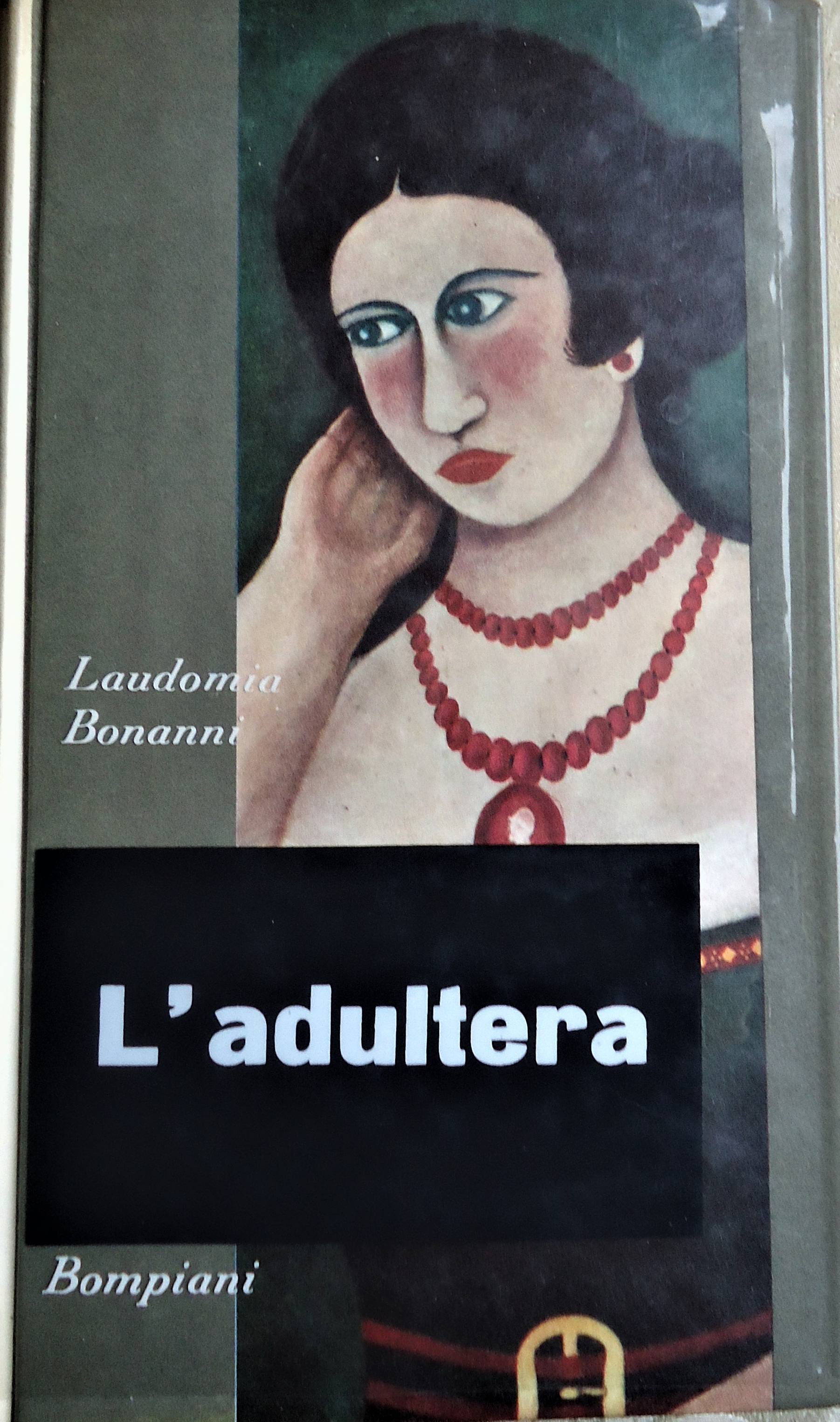 Prima edizione del romanzo di Laudomia Bonanni "L'Adultera" ( Bompiani 1964). Copertina con dipinto di Orneore Metelli (Terni, 2 giugno 1872 – Terni, 26 novembre 1938). Foto con la sovracopertina di plastica trasparente. (Coll. Fausta Samaritani-prime edizioni).